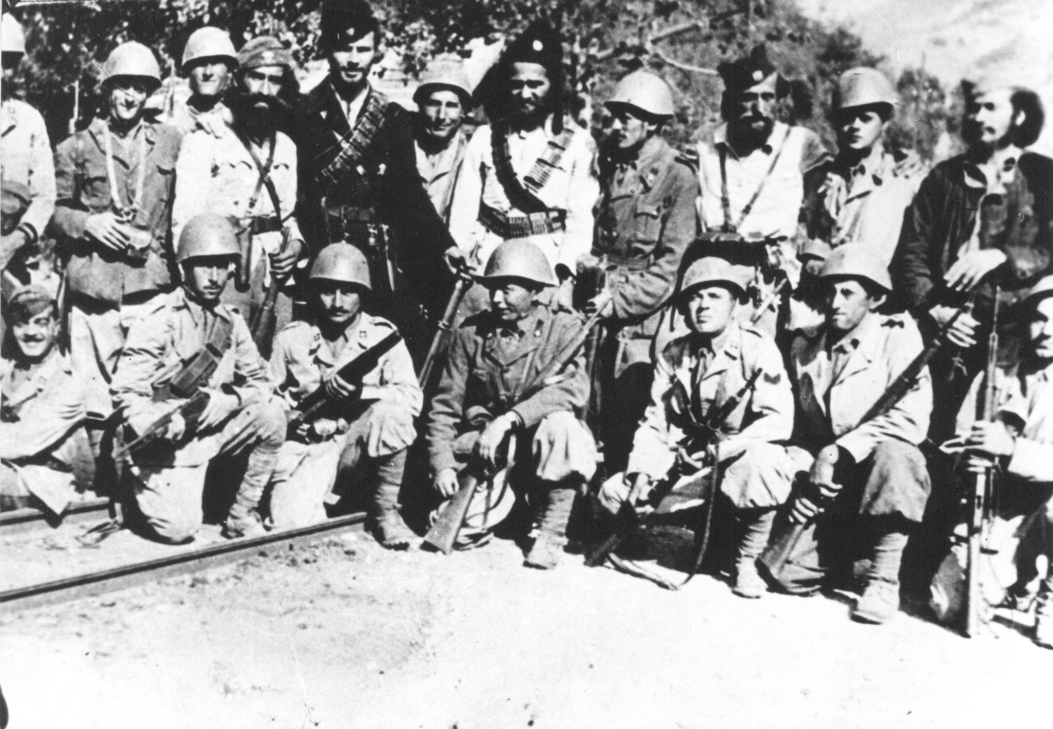 Srpskohrvatski / српскохрватски: Italijani i četnici u Jablanici 1943.